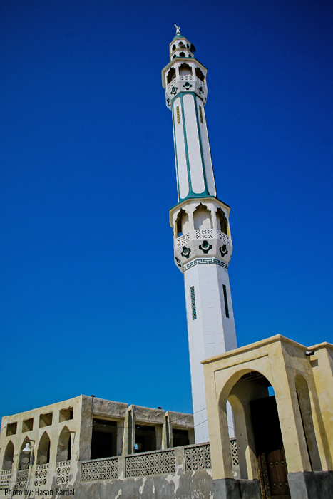 نمایی از بندر لافت ، بندر بادگیرها